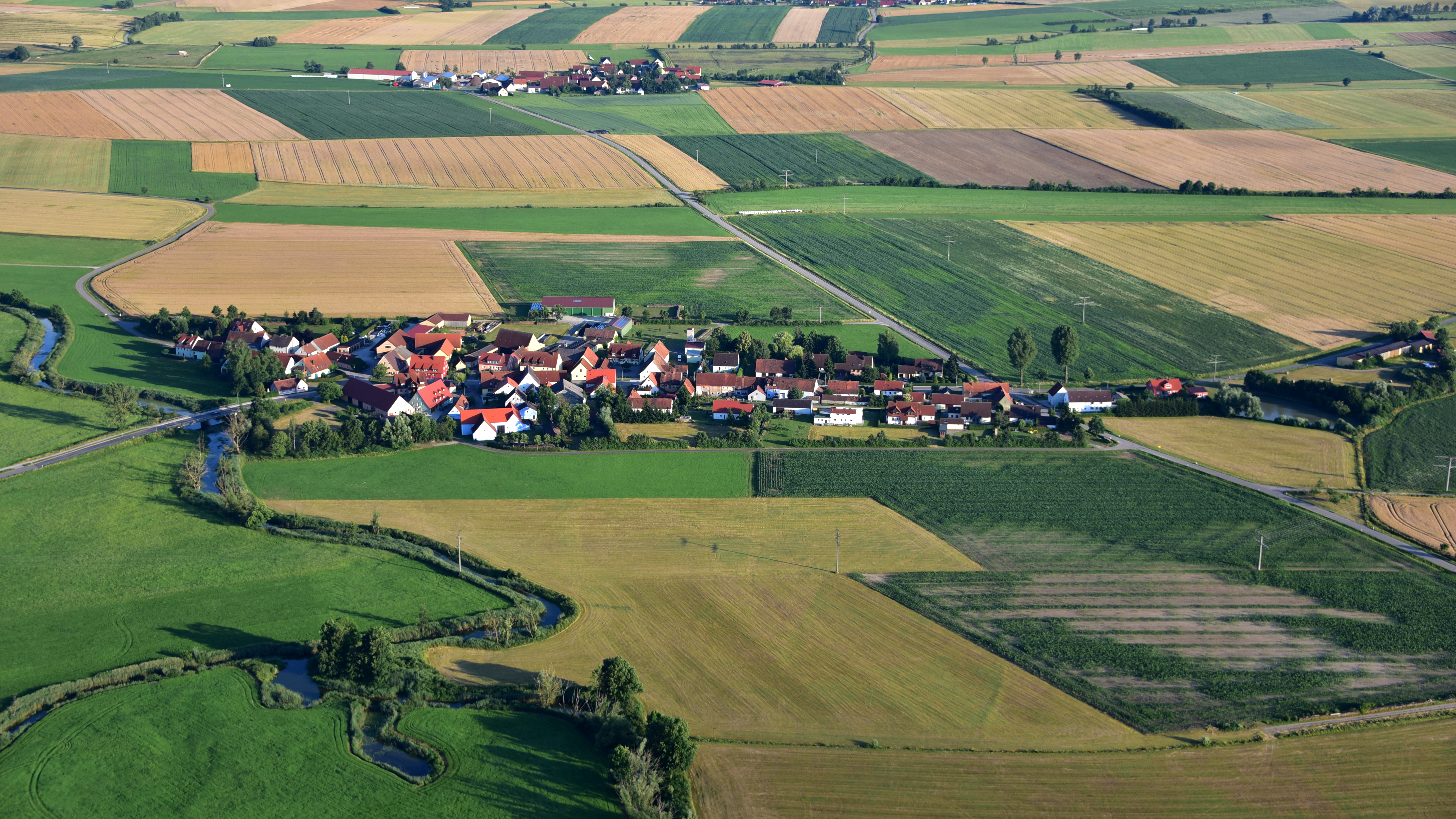 Stegbruck, Luftaufnahme (2016)